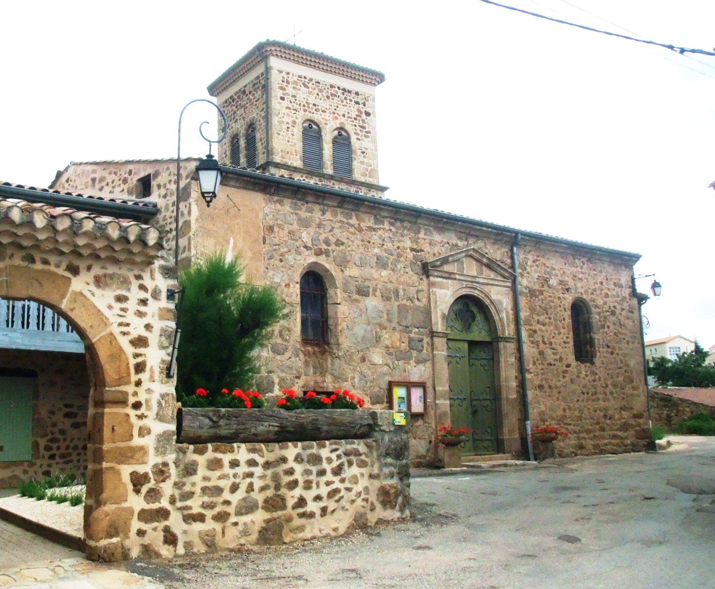 Saint-Clair (Ardèche) église façade sud